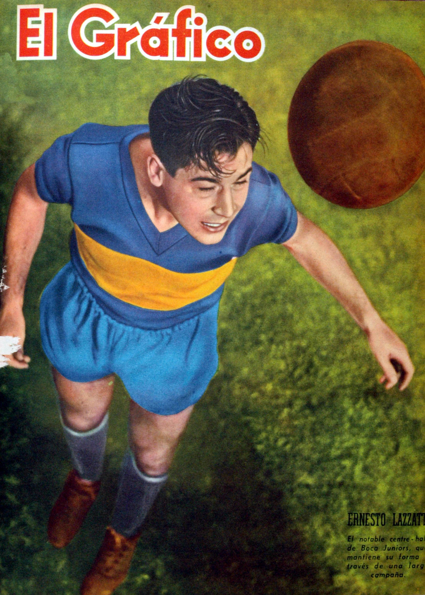 El Grafico del 22 de Agosto de 1941. Edicion 1154